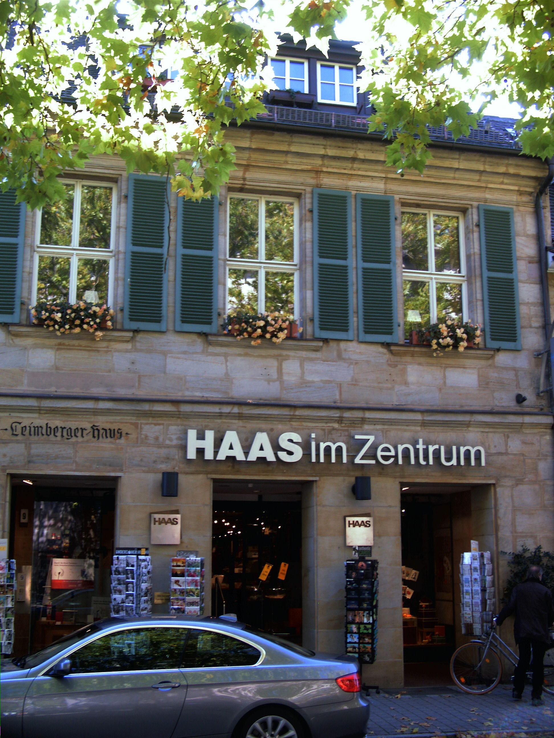 Leinberger Haus, aktuell Schreibwaren Haas